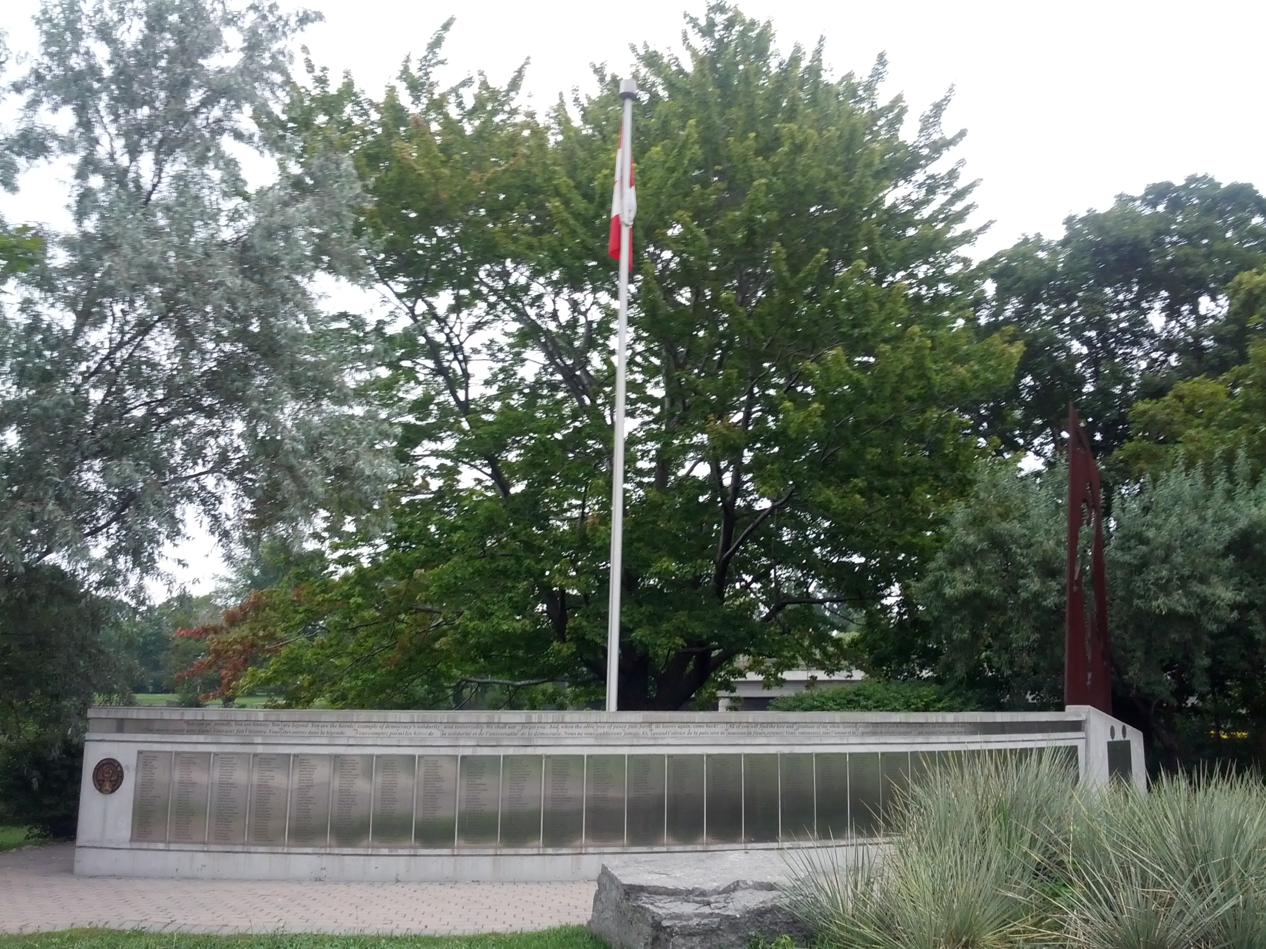 Monumento em Ottawa.